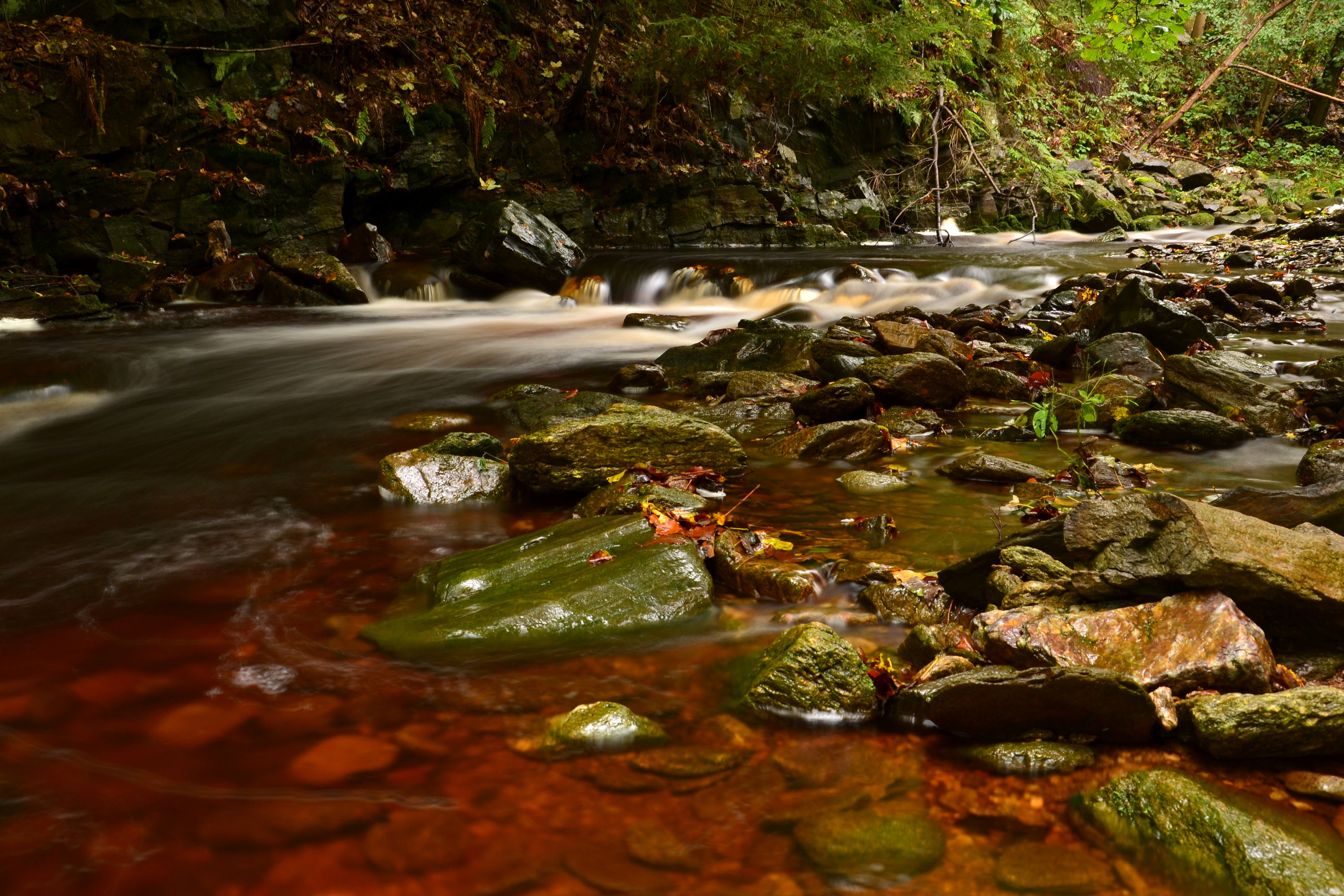 Chomutovka